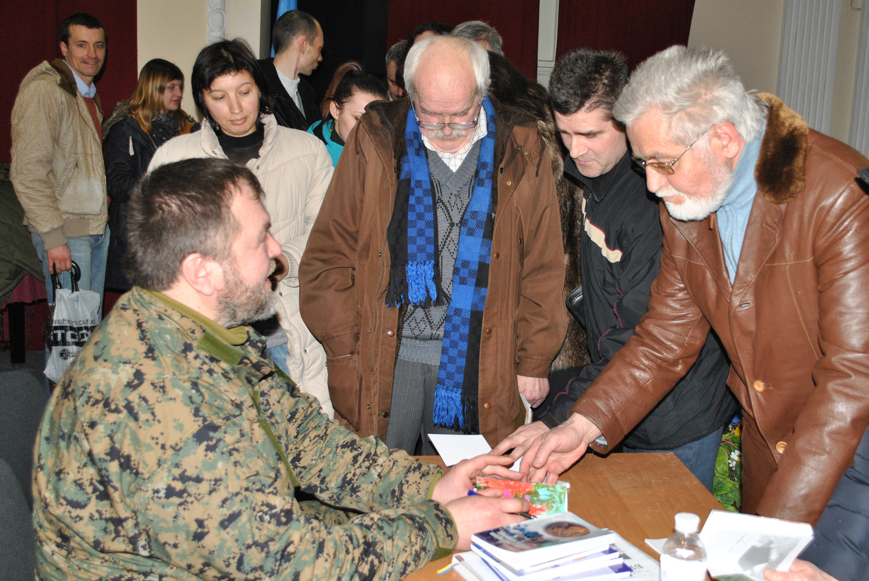 Зустріч із Борисом Гуменюком та його побратимами з батальйону «ОУН» в Українському Домі «Перемога» в Тернополі 2 березня 2015 року: презентація «Віршів з війни» та розмова про війну та її Героїв. Книжку з рук автора отримує Василь Ященко.